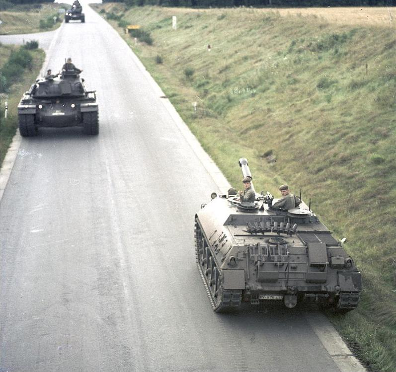 Reportage Bundeswehr Kanonenjagdpanzer, Munsterlager, KTrS III [Munsterlager, Truppenübungsplatz in der Lüneburger Heide]